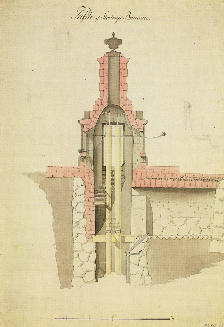 Sektion genom Stortorgsbrunnen i Stockholm